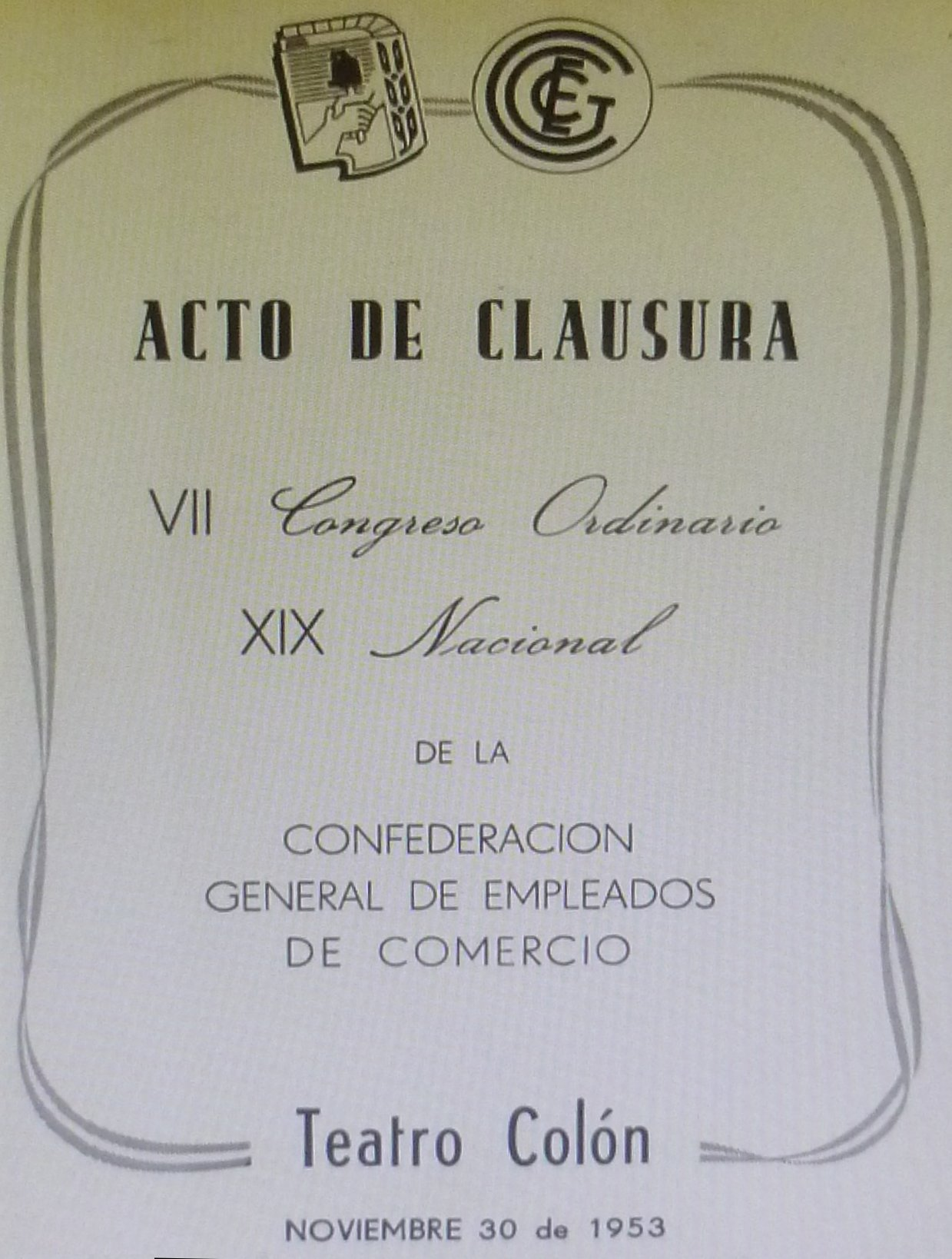 Foto del Programa de Cierre del Congreso 1953 de la Confederación General de Empleados de Comercio en el Teatro Colón.